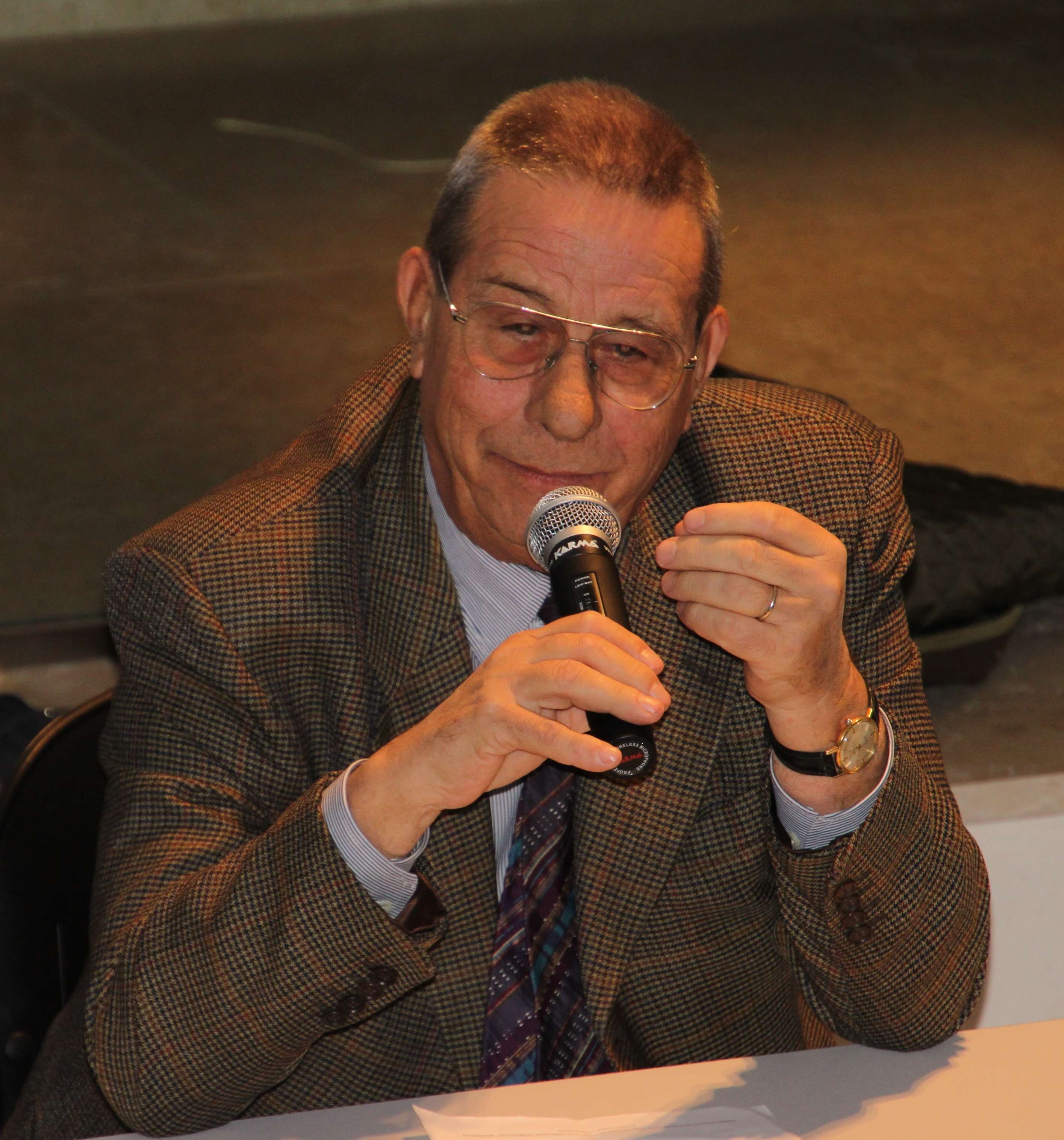 Ernesto Brunetta